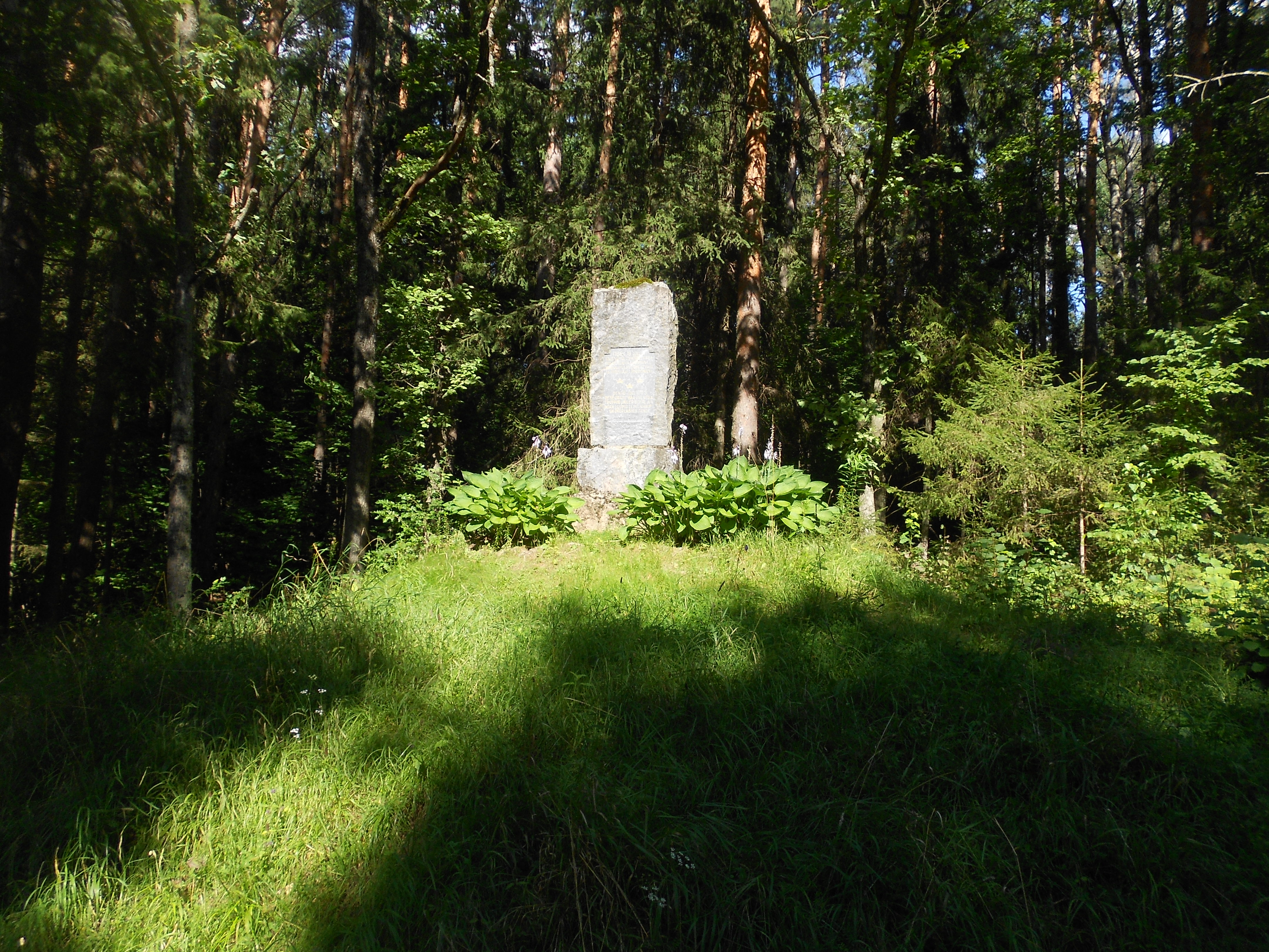 Denkmal zur Schlacht bei Gemauerthof mit lettischer und schwedischer Inschrift. Errichtet 1935